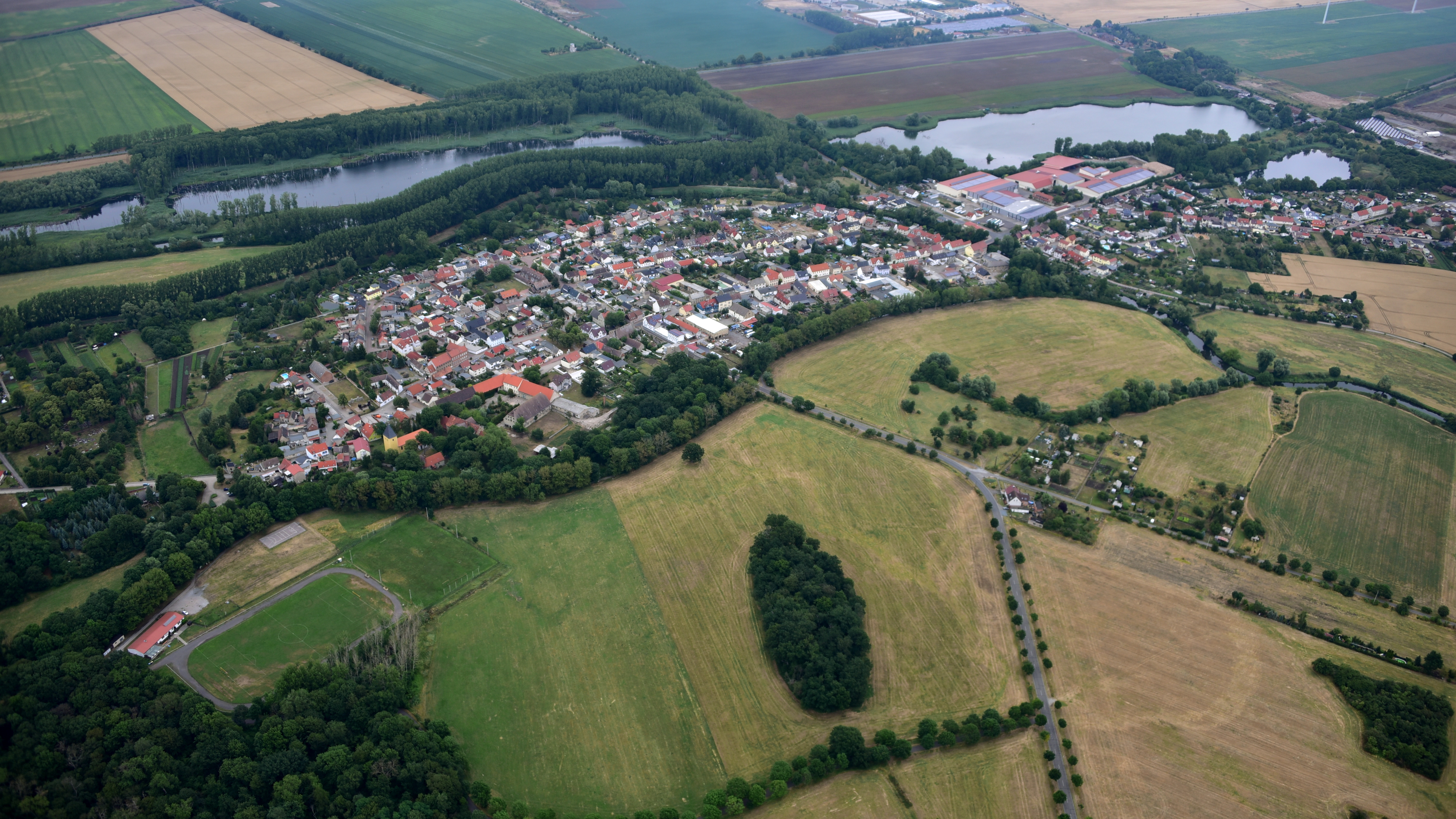 Unseburg, Luftaufnahme (2019)